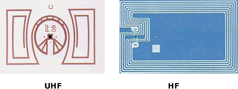 Formas de las antenas impresas de una etiqueta RFID